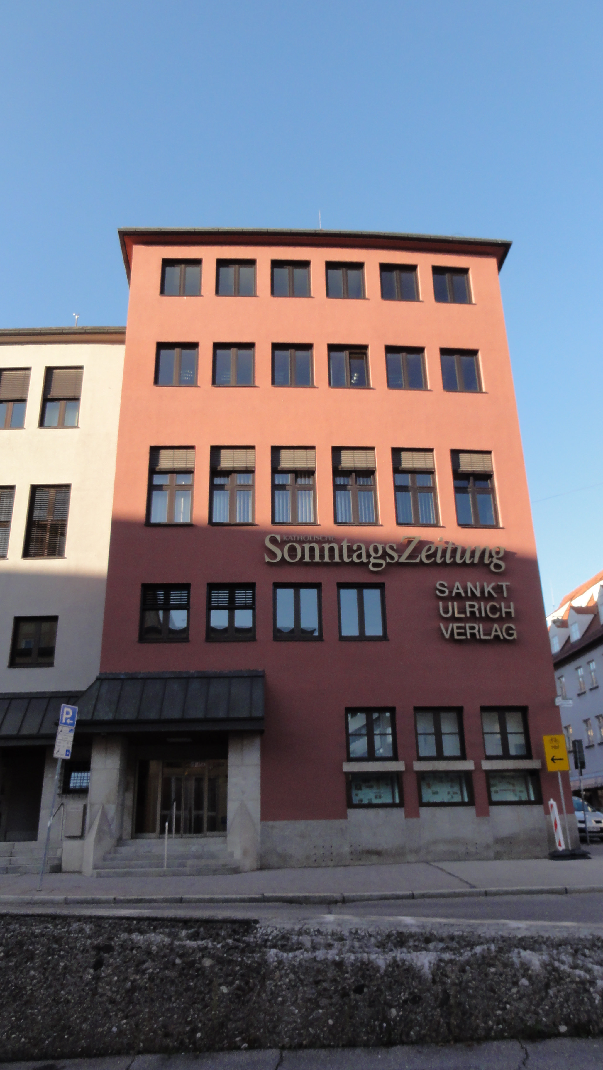 Augsburg-Domviertel